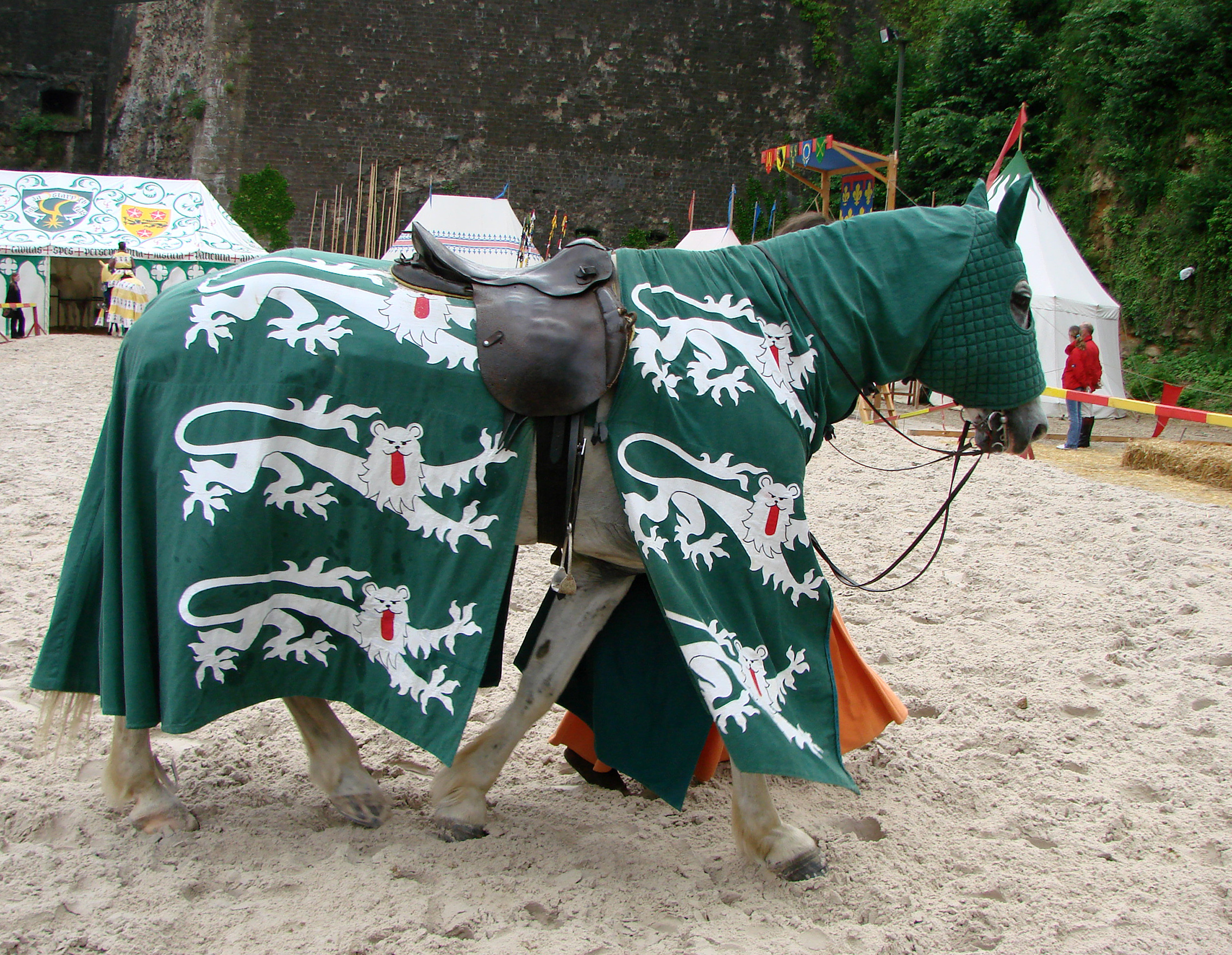 Cheval harnaché pour un spectacle de tournoi: la troupe Normani,au festival médiéval de Sedan, le 20 Mai 2007.